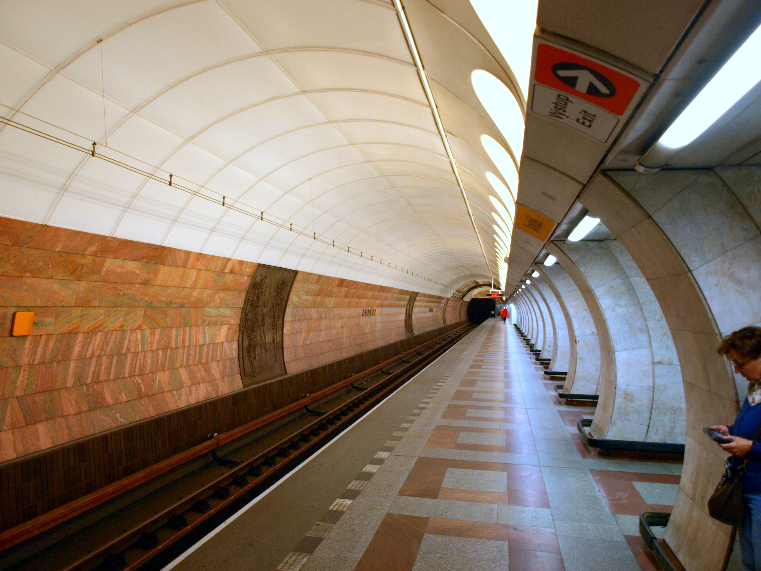 Metro Anděl